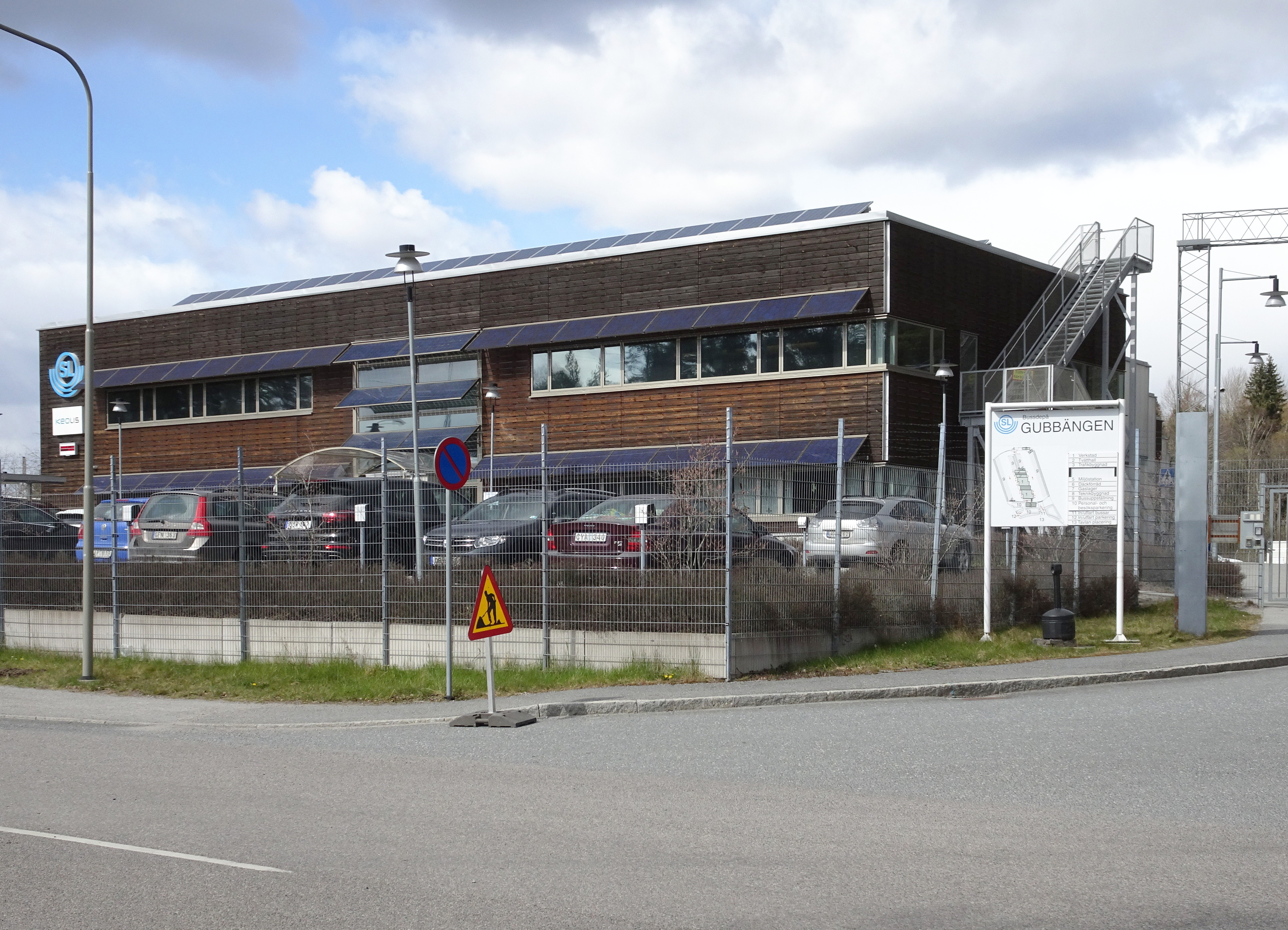 Gubbängsdepån, SL:s bussdepå i Gubbängen